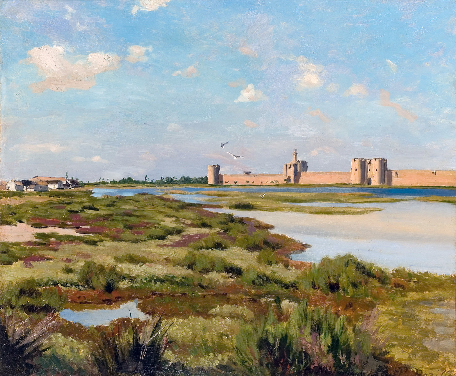 Les remparts d'Aigues-Mortes, Frédéric Bazille, Musée Fabre, Montpellier.